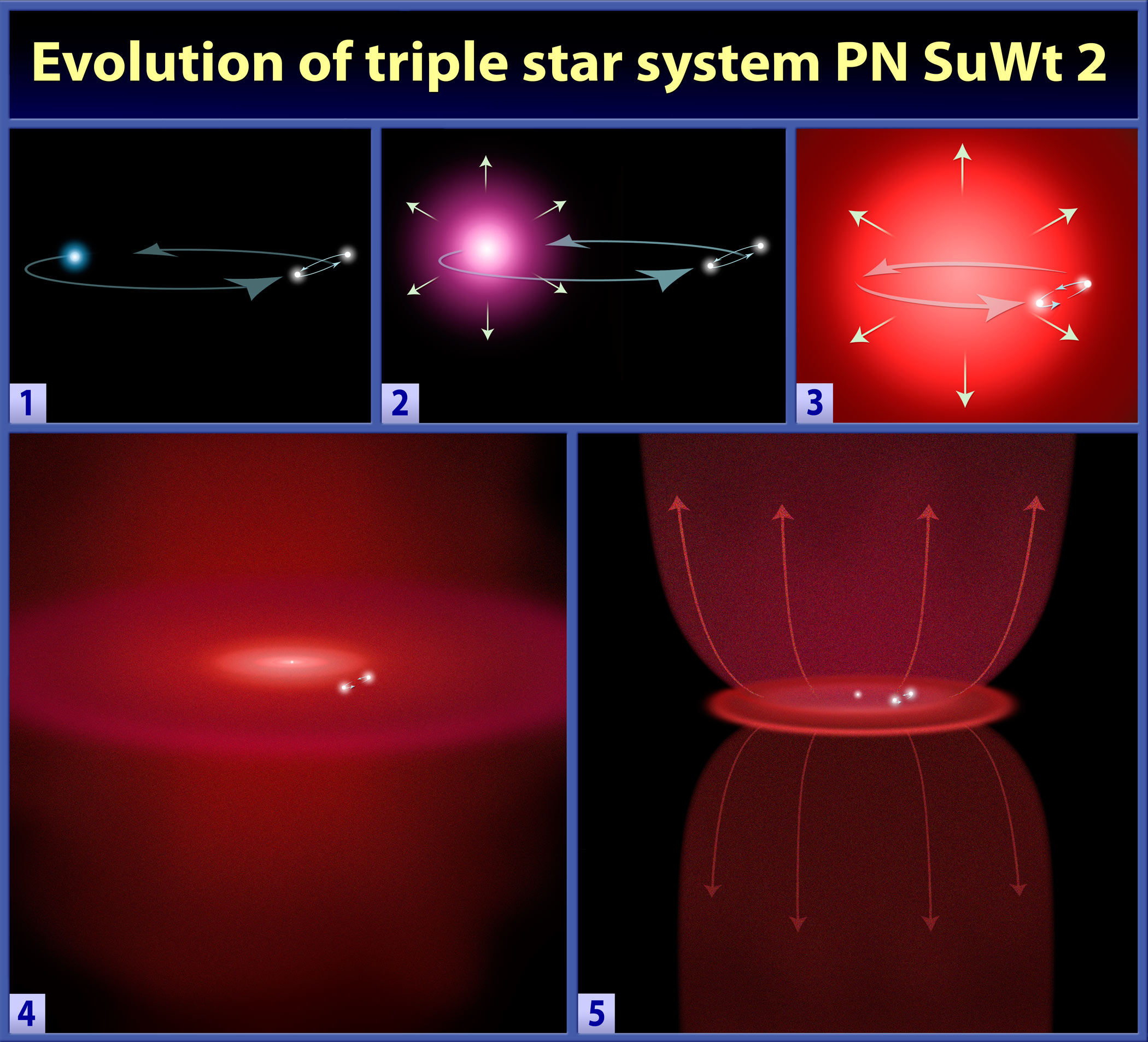 Planatary nebulae